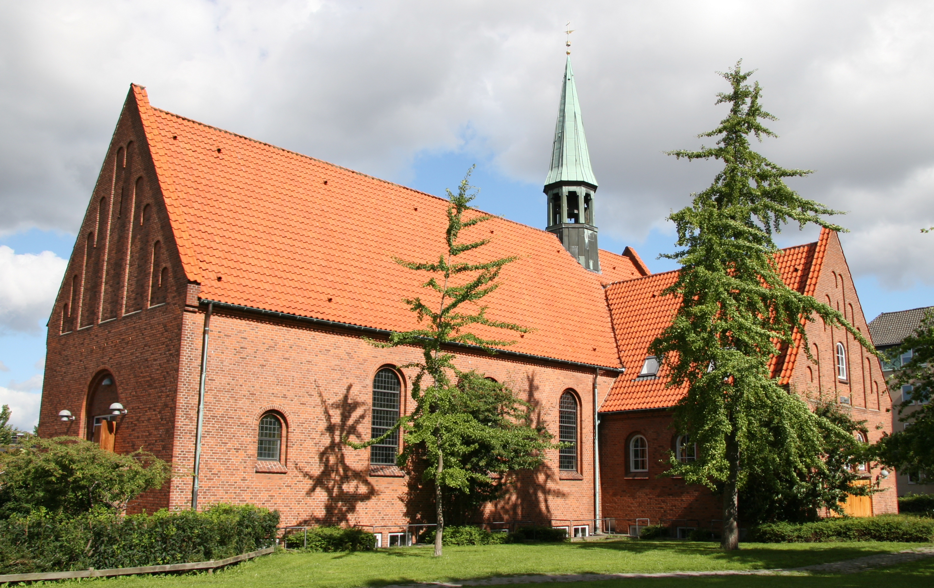 Flintholm Kirke in Copenhagen, Denmark. Exterior.